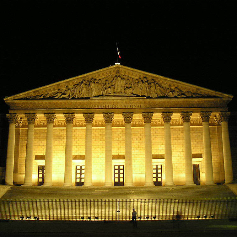 Le Palais Bourbon éclairé de nuit